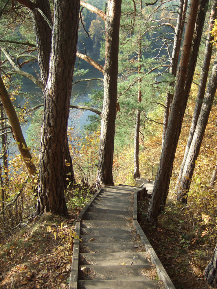 Karmazinų pažintinis takas